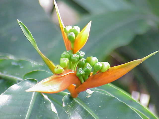 Species: Heliconia aurantiaca Family: Heliconiaceae Image No. 5